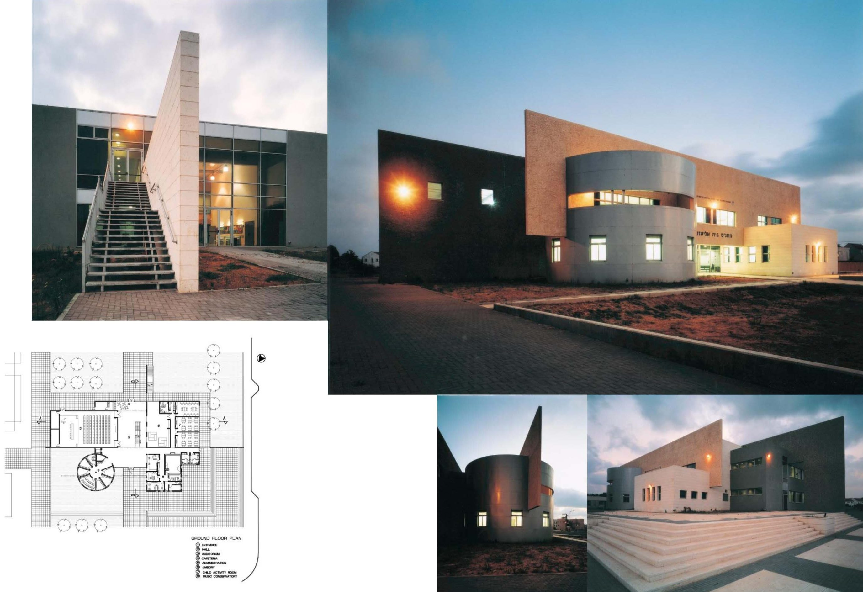 מתנס בית אליעזר, חדרה